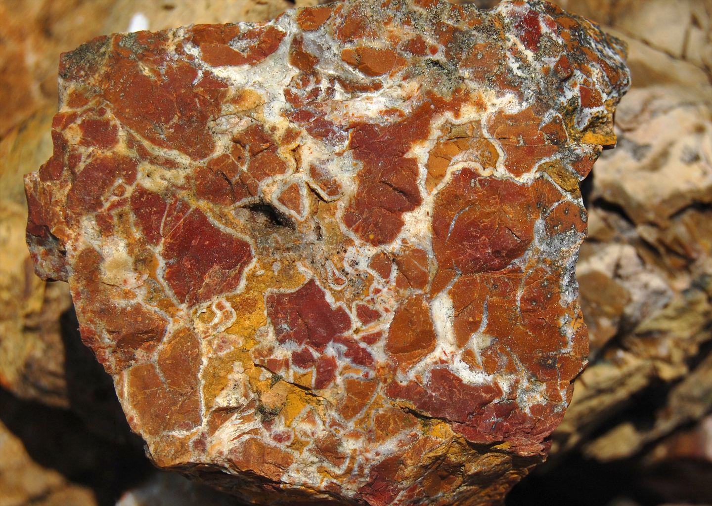 Bucegi mountains Romania